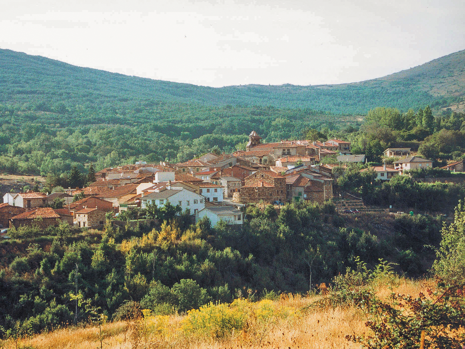 Vista general de Horcajuelo de la Sierra.